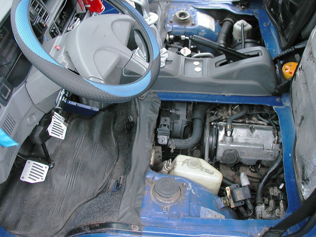 한국GM 다마스(후기형, 1997년식) 엔진룸